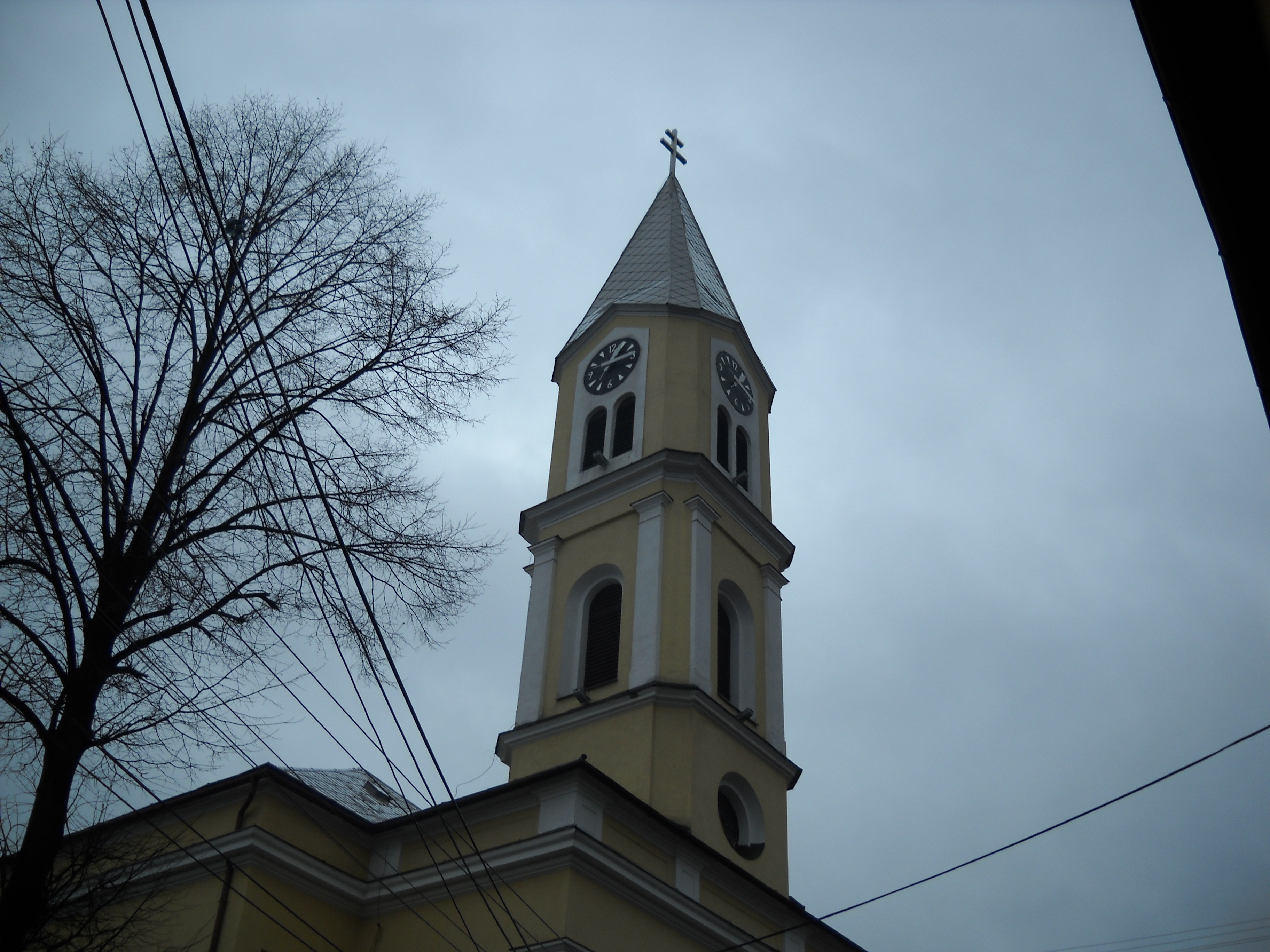 Veža sv. Ondreja bola postavená na konci výstavby farského kostola sv. Ondreja v Krásne nad Kysucou v roku 1865. Oficiálne však bola otvorená až v roku 1867. V roku 2004 bola časť strechy zničená a bola nútná oprava strechy veže.